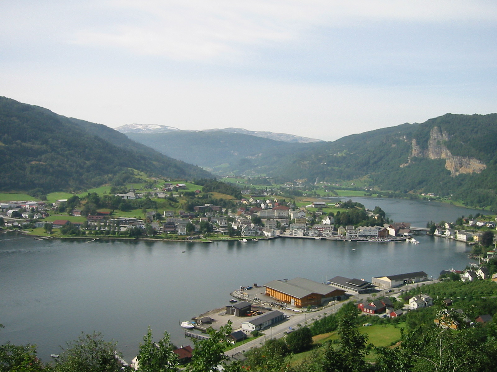 Norheimsund sett fra Tolomarka med Steinsdalen i bakgrunnen